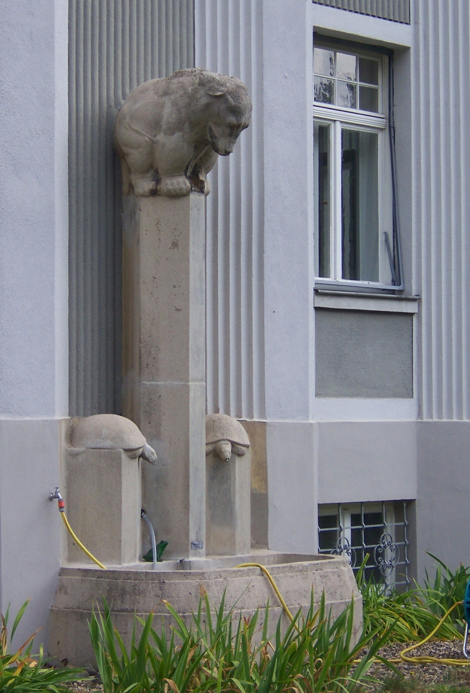 Otto Pilz – Bärenbrunnen mit zwei Schildkröten an einem Wohnhaus in Dresden-Strehlen